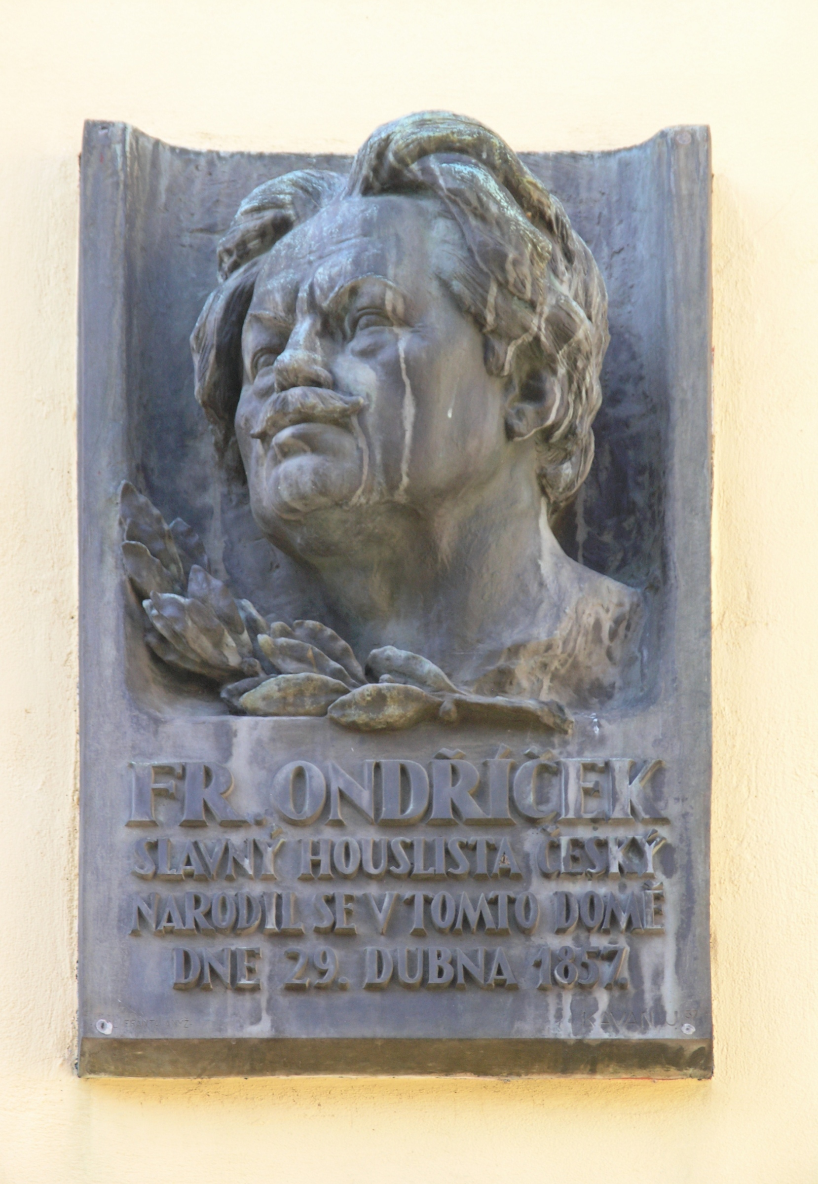 Praha, Hradčany - pamětní deska Františka Ondříčka na jeho rodném domě (U Zlatého pluhu, Nový svět 25)